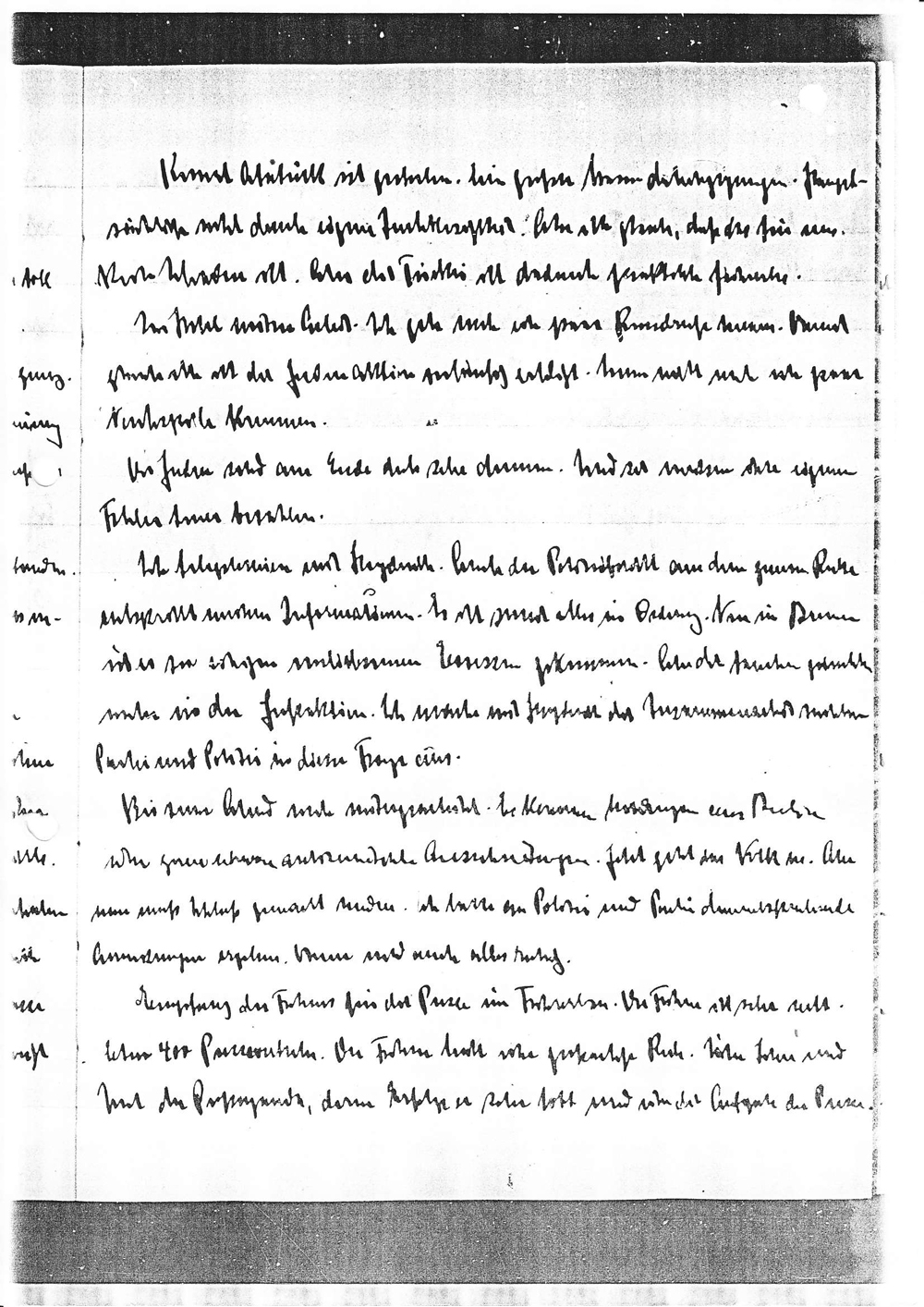 Tagebucheinträge Joseph Goebbels vom 10. und 11. November 1938